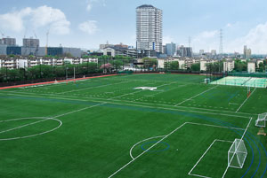 獨協大学中央棟から見たグランド